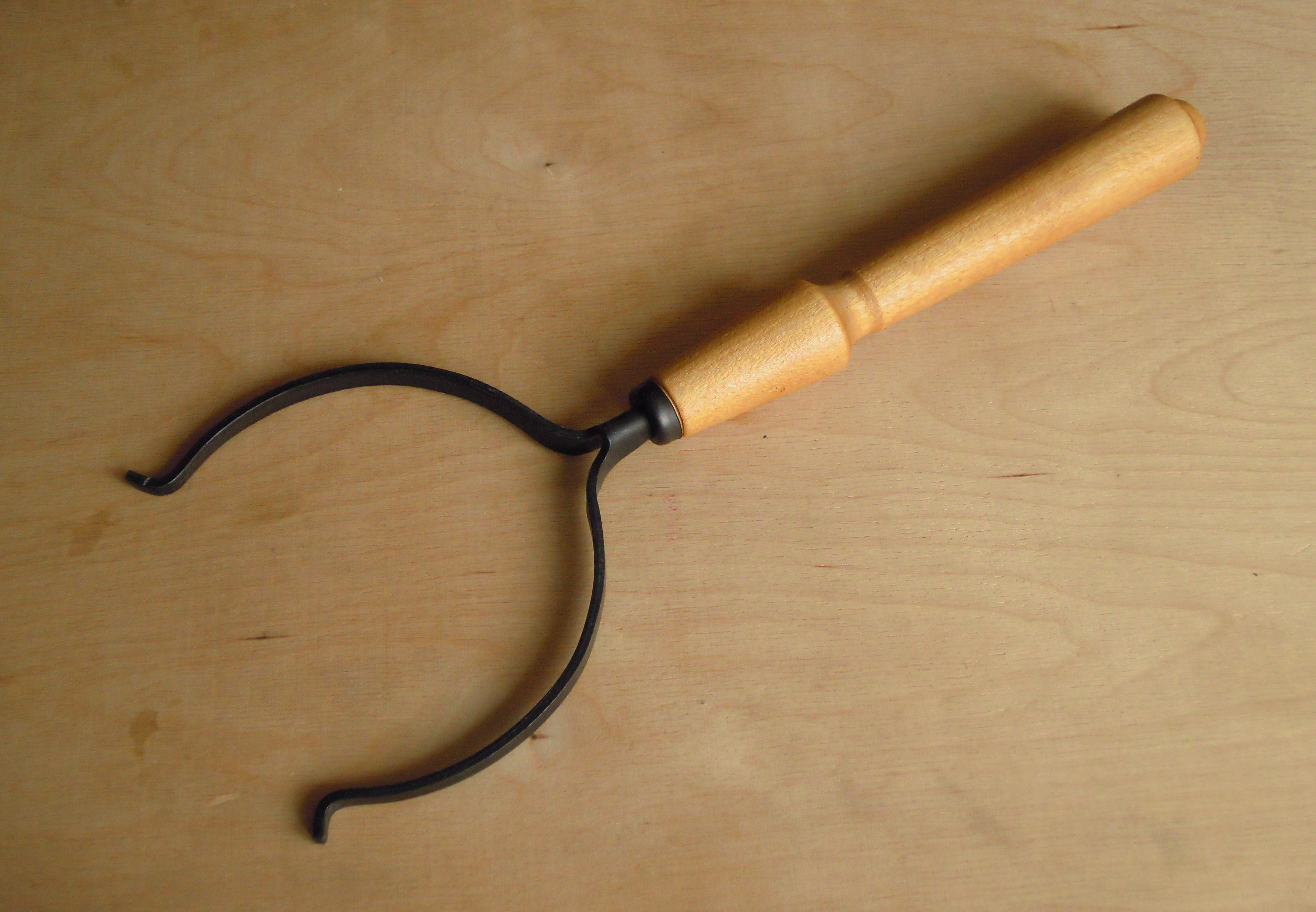 Ухват